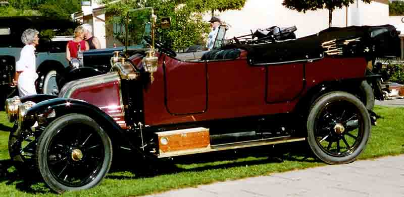 Renault DM Tourer 1914